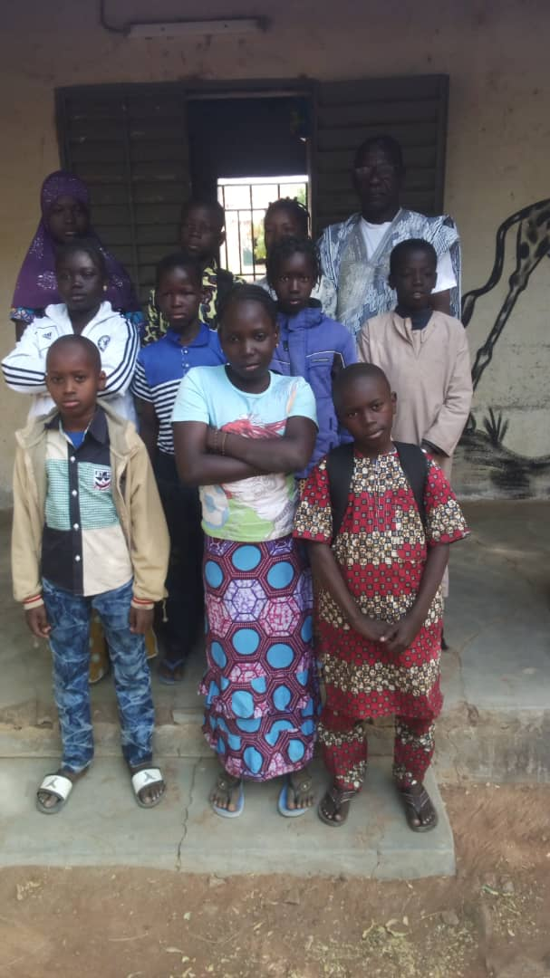 Concours wikichallenge écoles d'afrique 2019